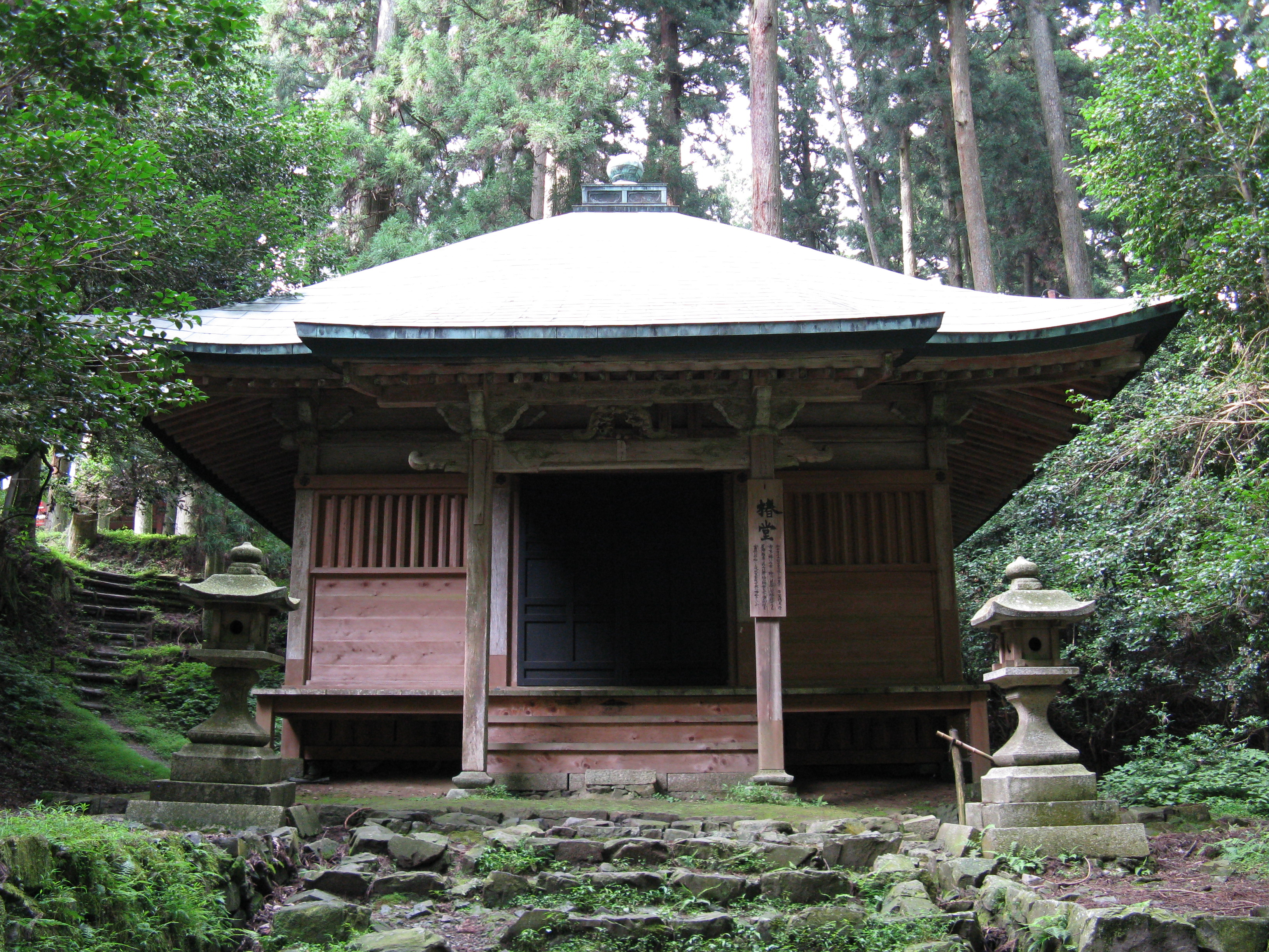 延暦寺 椿堂